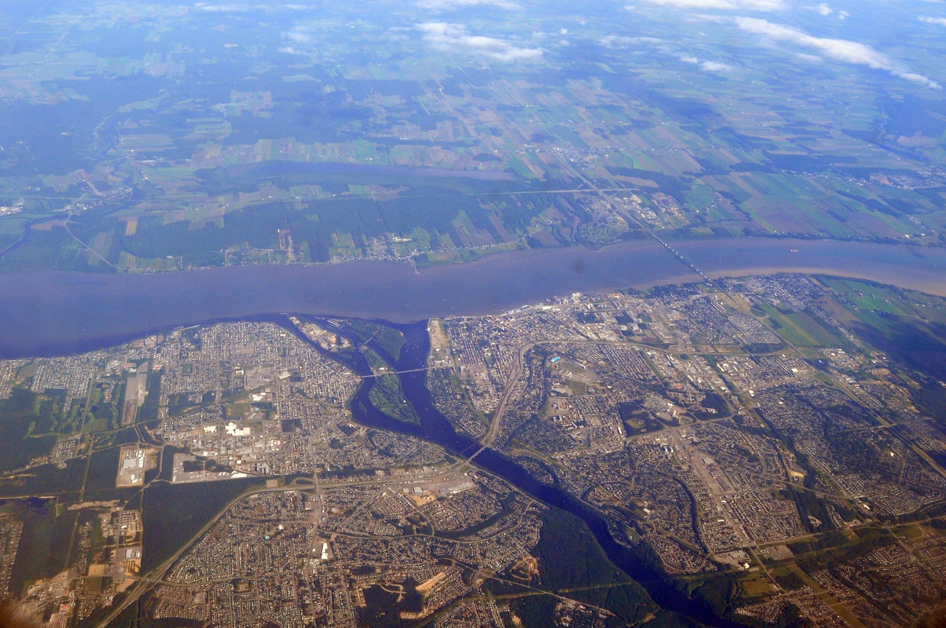 rivière Saint-Maurice (bleu foncé) qui se jette dans le Saint-Laurent (bleu pâle)